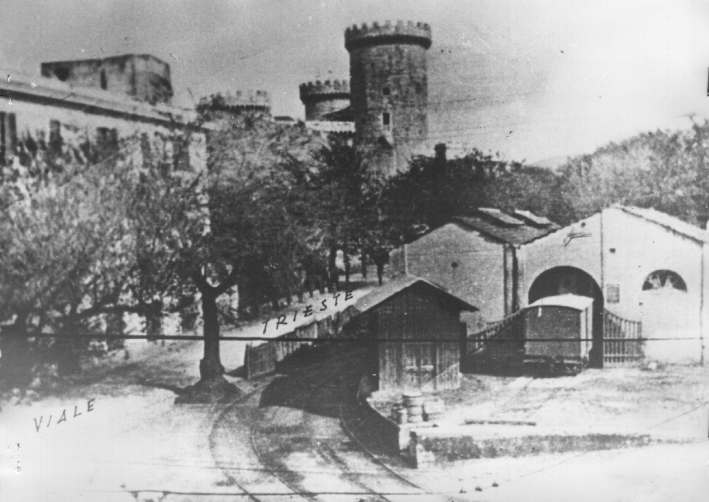 tram Roma-Tivoli